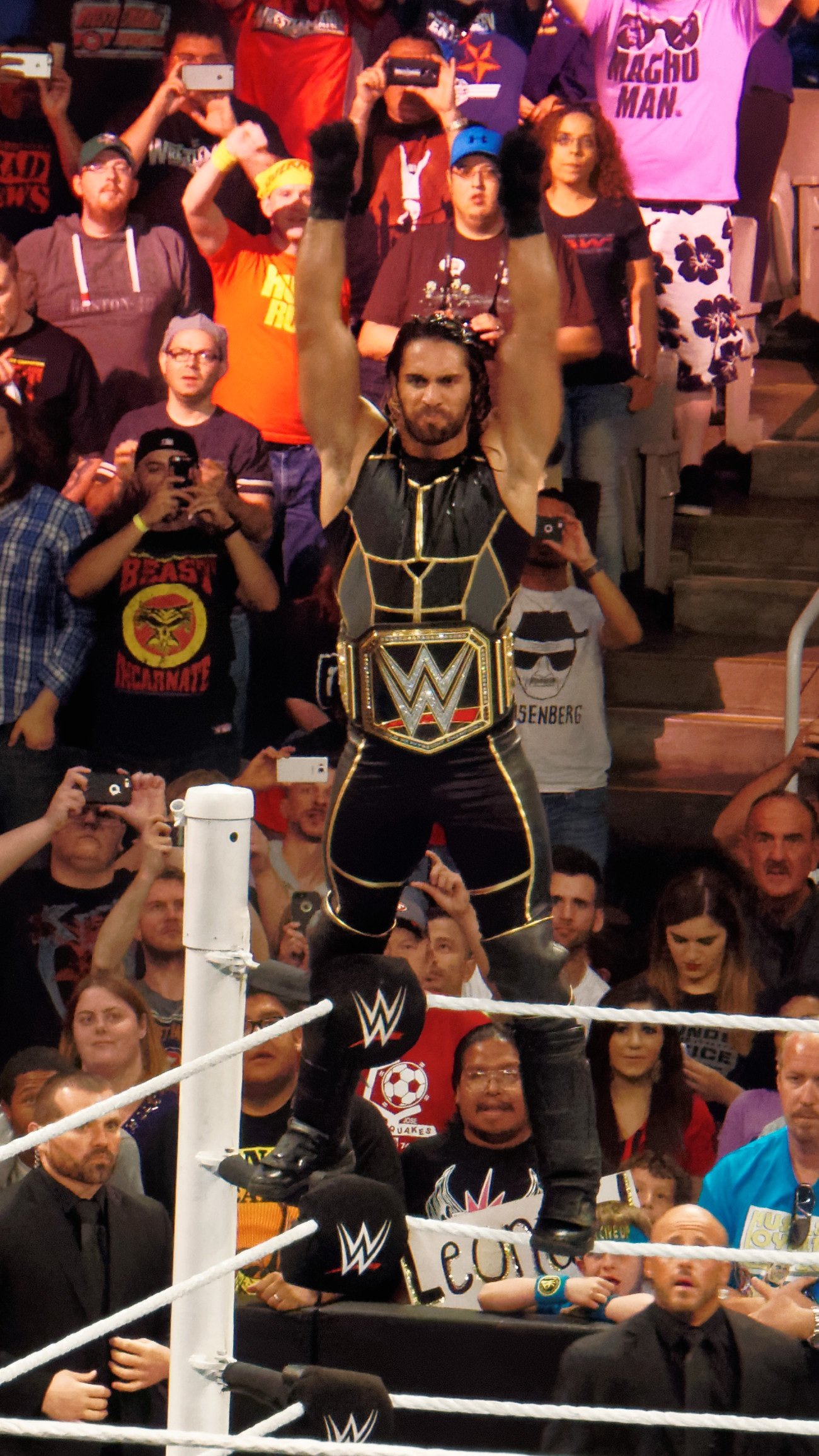 2015-03-30_18-01-52_ILCE-6000_1527_DxO